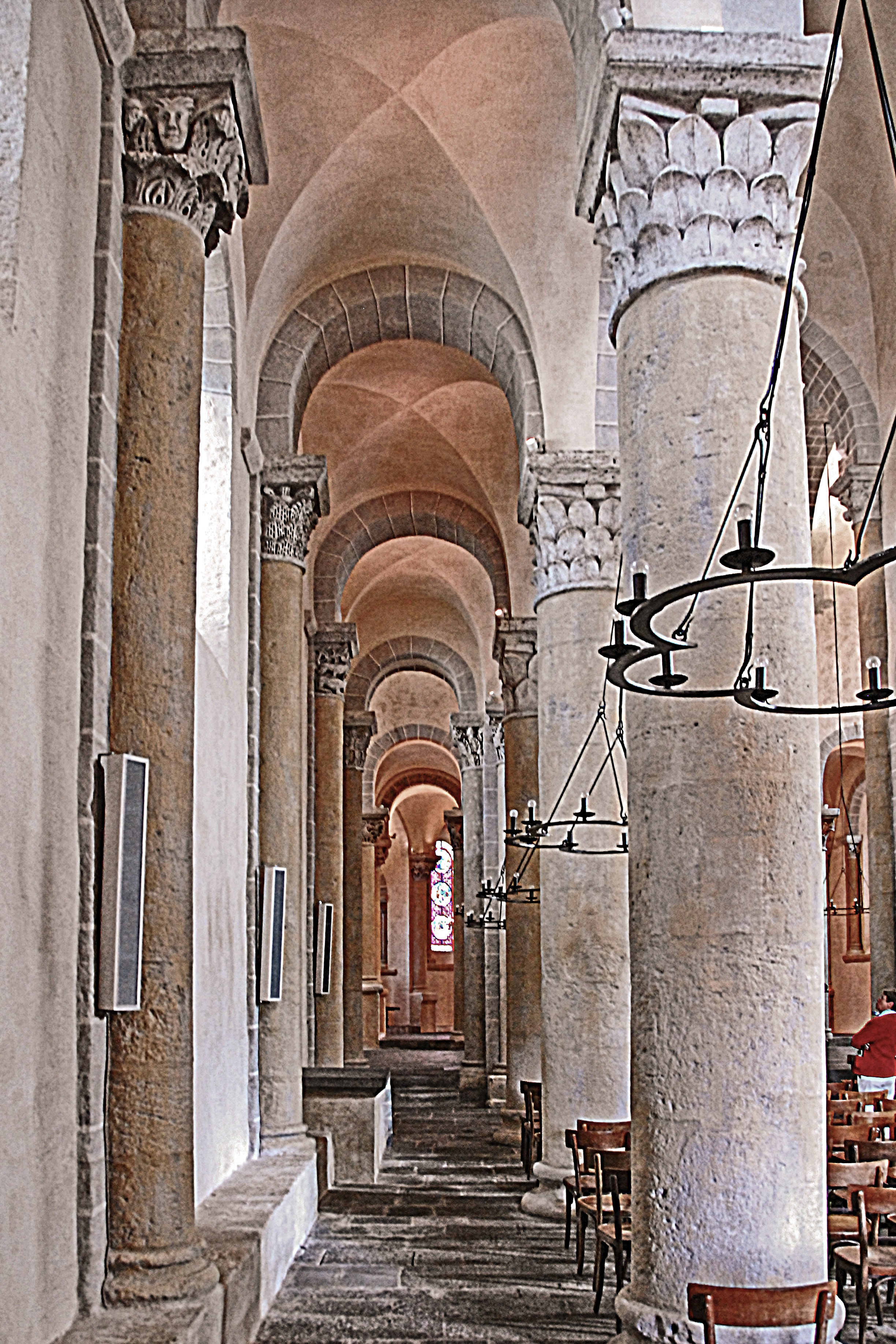 St-Nectaire, südl. Seitenschiff, nach vorne